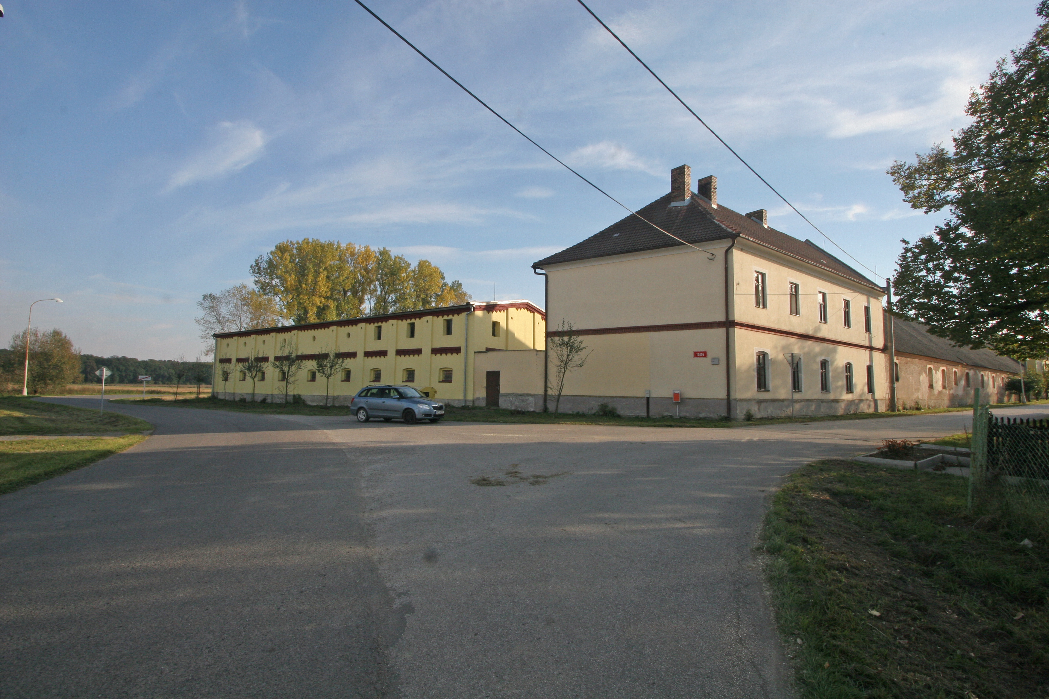 Tošov čp.19